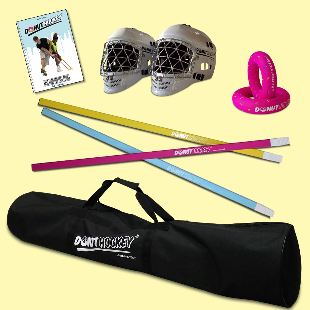 Donut Hockey-Ausrüstung mit Lehrbuch, Torhütermasken, Donuts, Stöcken und Materialtasche